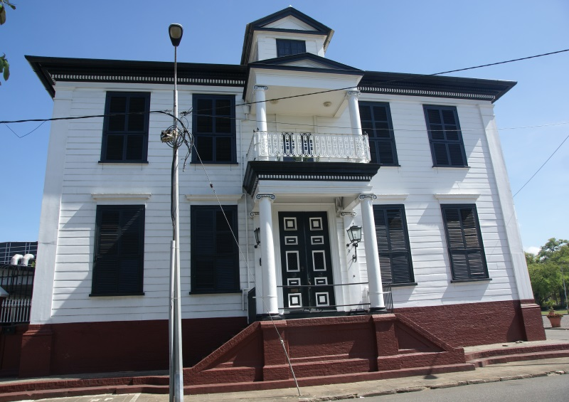 Waterkant 2, Paramaribo, Suriname